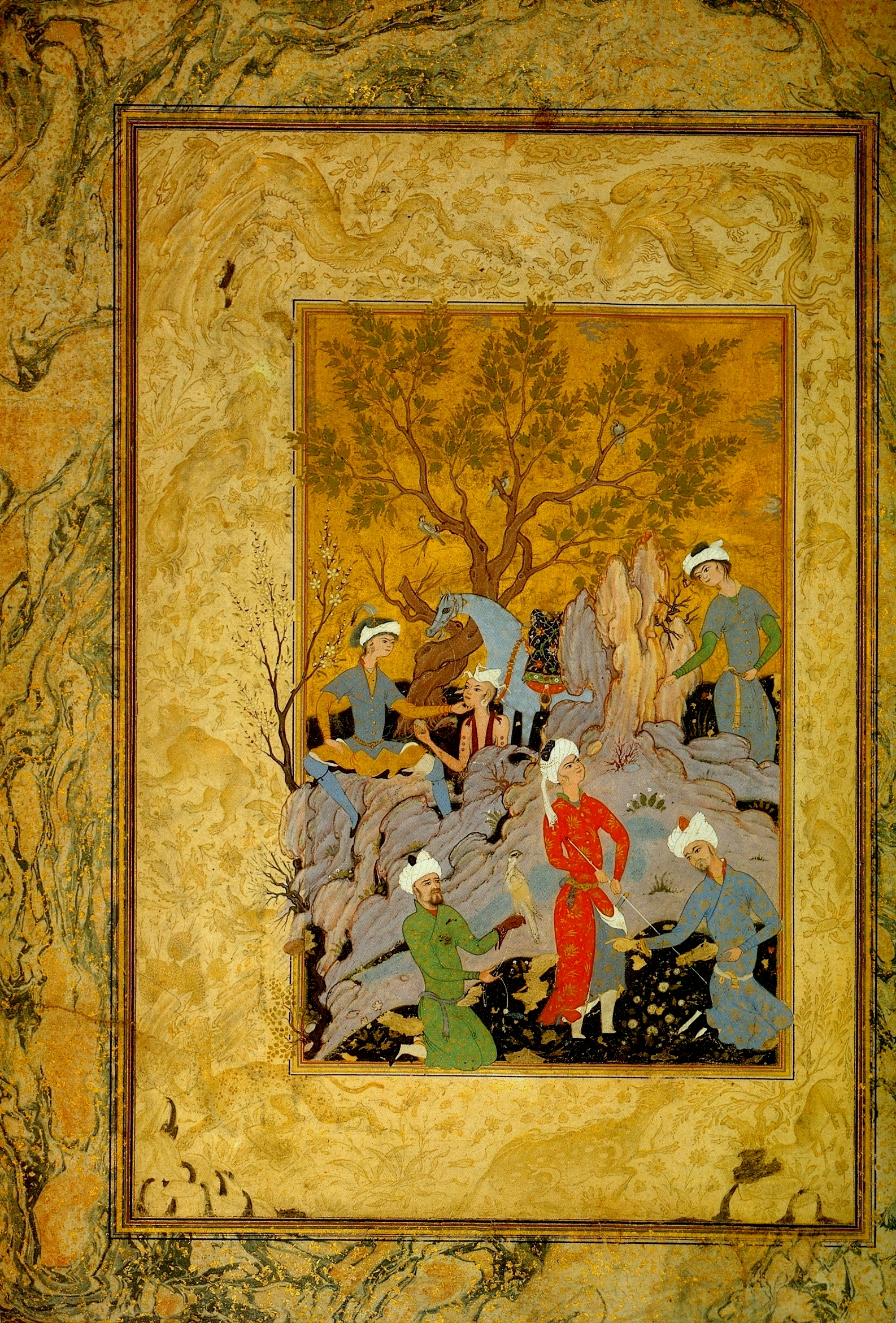 Мирза Али. Охотничий привал. 1570-80